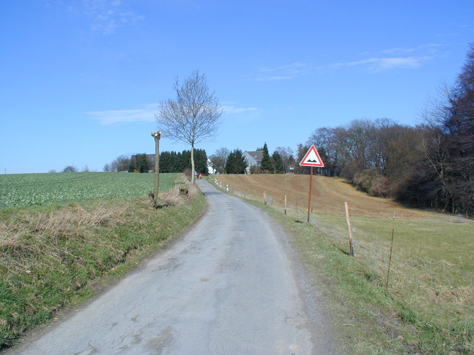 Mettmann-Steinöckel, Alte Kölnische Landstraße (4)